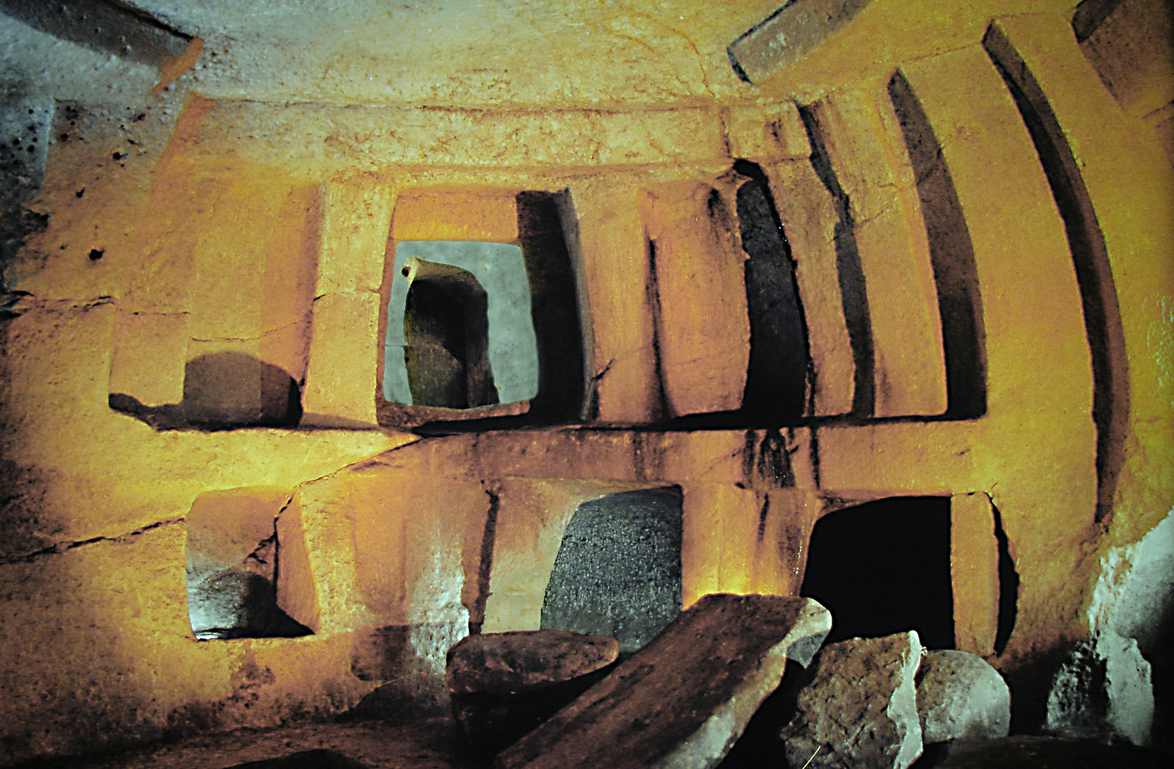 Hypogée Hal Salfieni patrimoine mondiale de l'Unesco